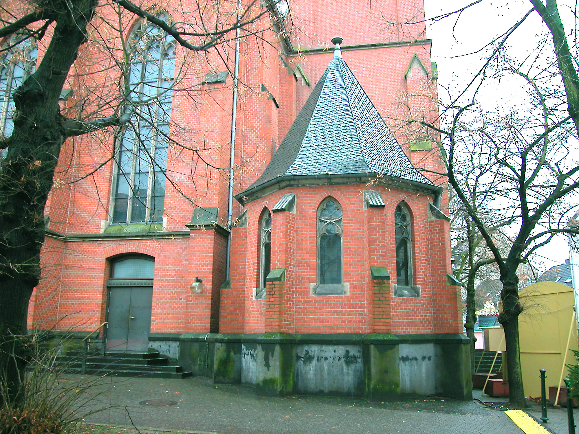 Das Aussehen der Kirche